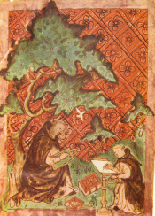 De Ruusbroec-miniatuur in het handschrift K.B. Brussel, 19.295-97. In deze gestyleerde voorstelling zien wij een monnik (links) die Ruusbroec zal voorstellen met in zijn linkerhand een wastafeltje en in zijn rechterhand een griffel, bezig met het schrijven van een tekst. Hiertoe lijkt hij geïnspireerd te worden door de Heilige Geest, die in de symbolische gedaante van een (witte) duif rondvliegt - wat een bescheiden voorstelling van zaken is, de duif had ook op zijn schouder kunnen zitten met zijn bek in Ruusbroecs oor, zoals te zien op miniaturen van bijvoorbeeld paus Gregorius de Grote. Rechts zien wij hoe een andere monnik, een kopiist, gezeten aan een schrijftafel, de tekst van een wastafel kopieert op een vel perkament. Aan hun beider voeten ligt het eindproduct: een codex, het met de hand geschreven middeleeuwse boek met een publieke functie. Het tafereel is geplaatst in een bosachtige omgeving, die het Rooklooster zal symboliseren, dat weggestopt lag in het Zoniënwoud ten zuiden van Brussel.